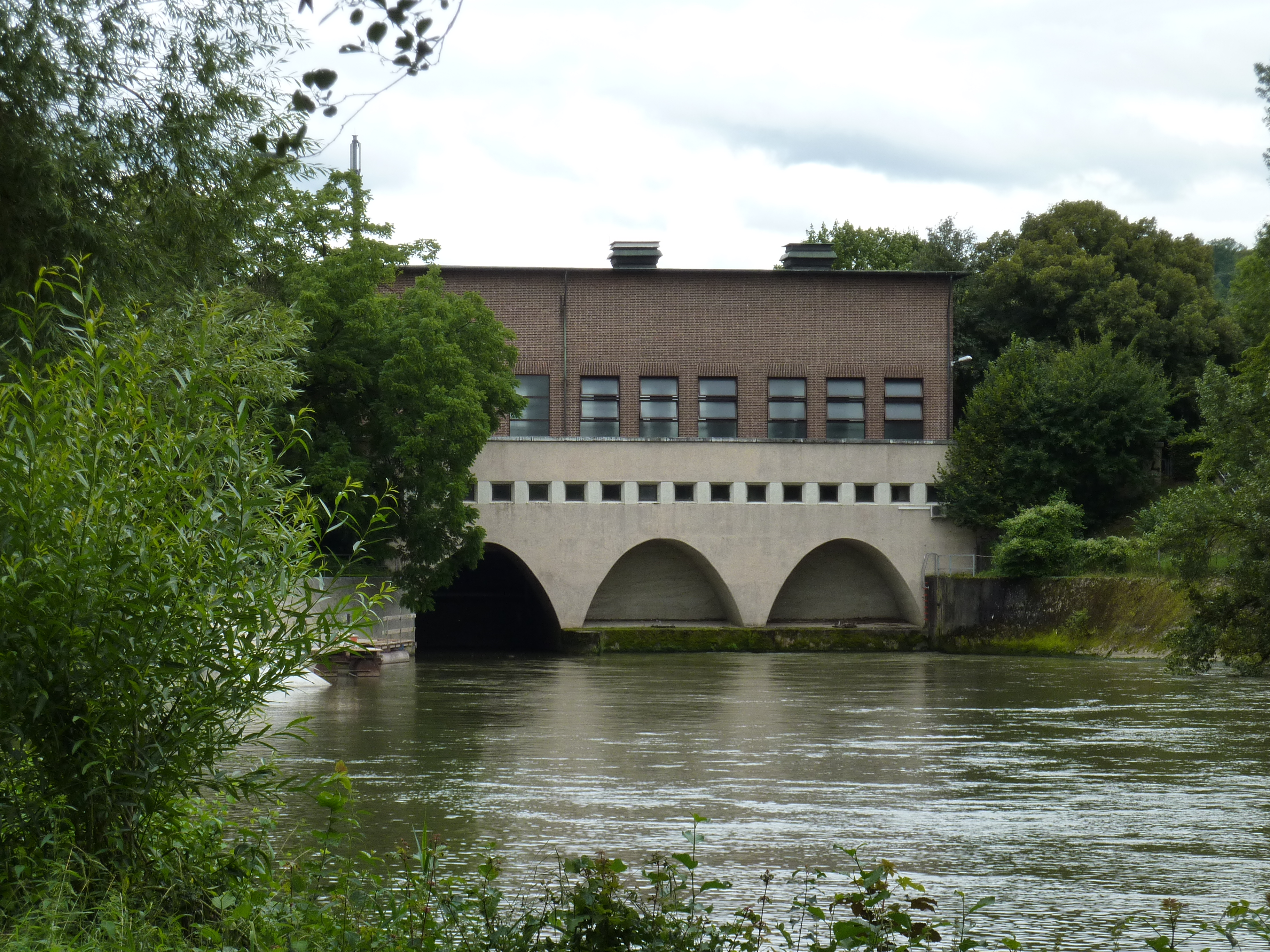 Kraftwerk Oberesslingen